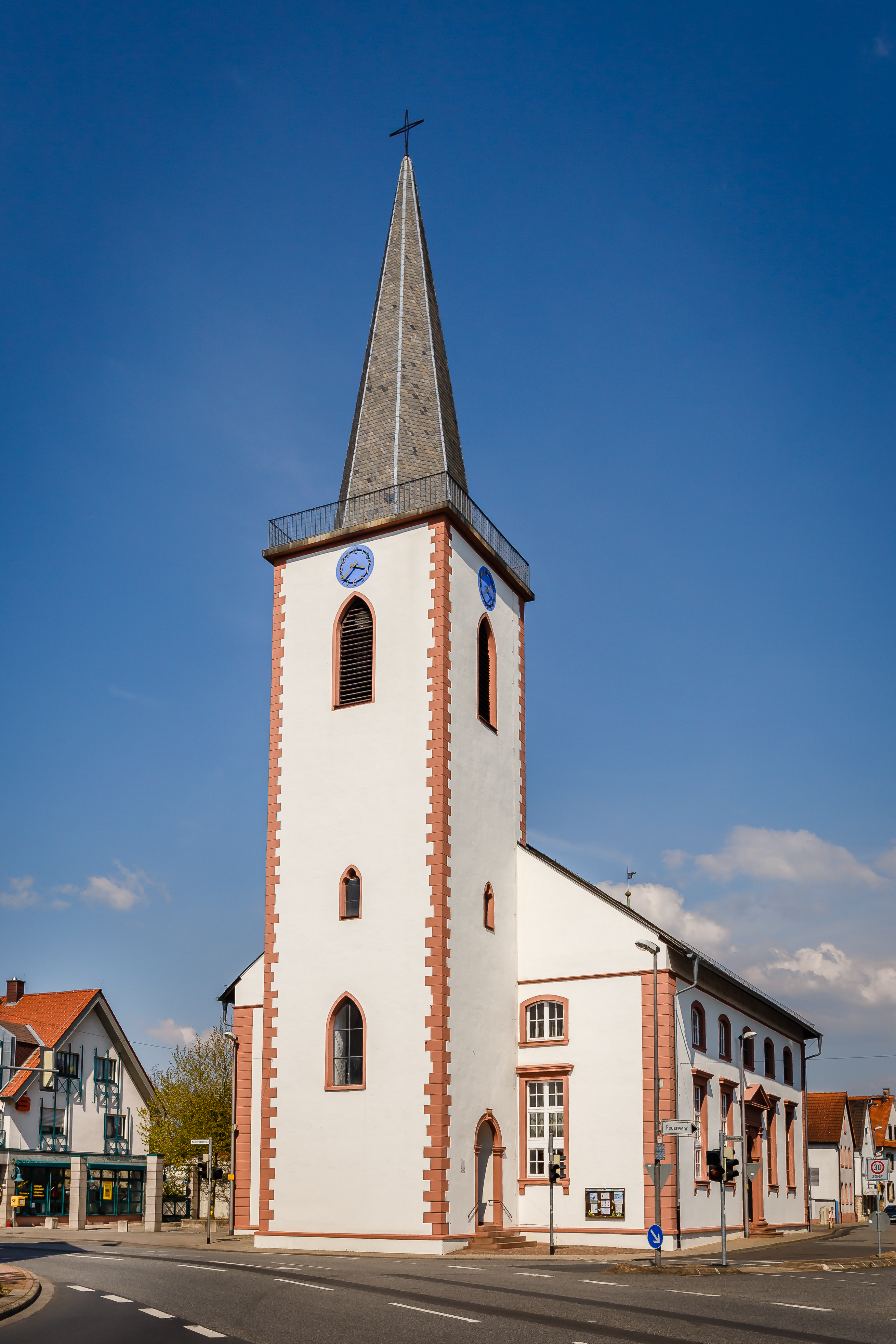 Bild der Sankt Michael Kirche in Dornheim